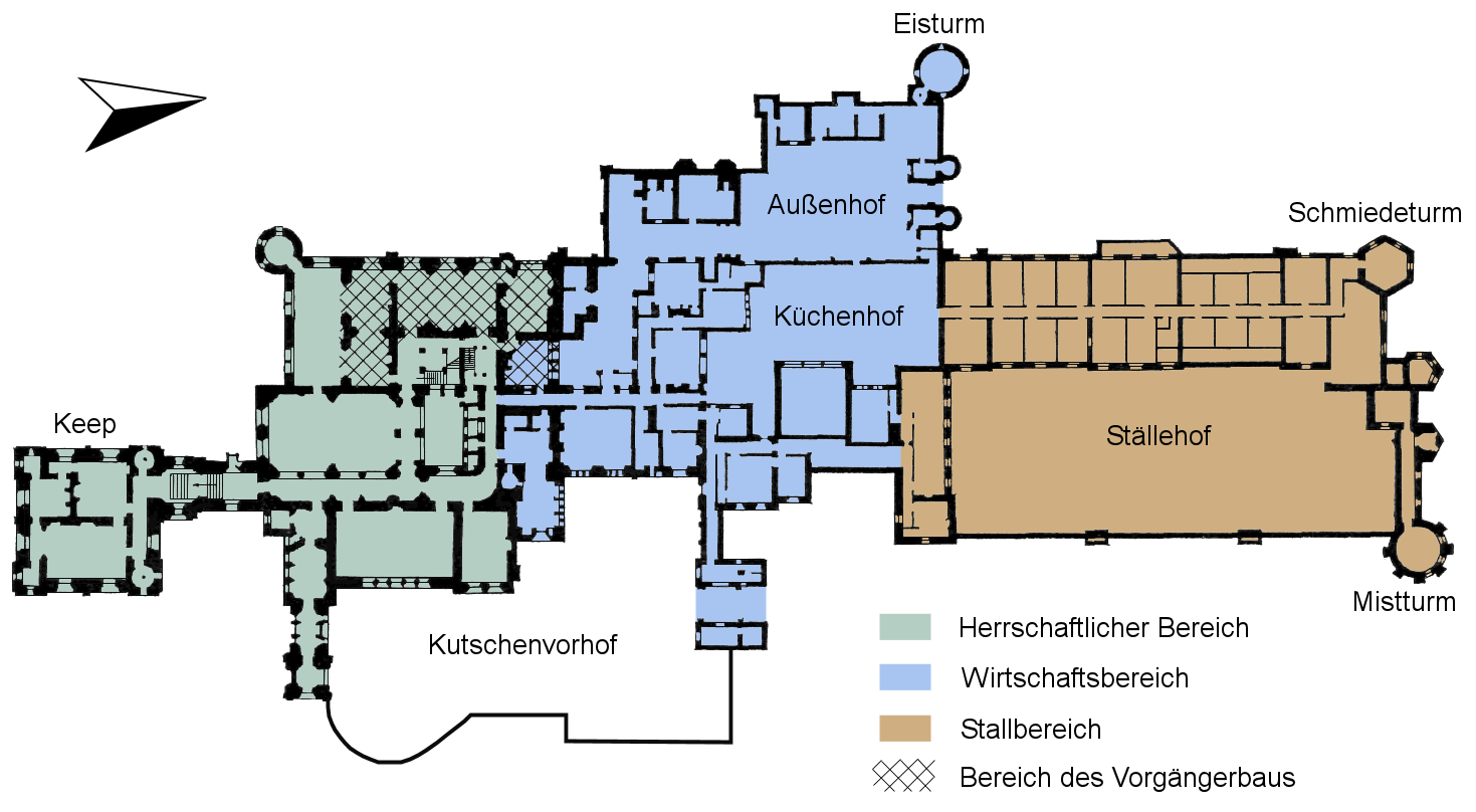 Grundriss von Penrhyn Castle, Wales